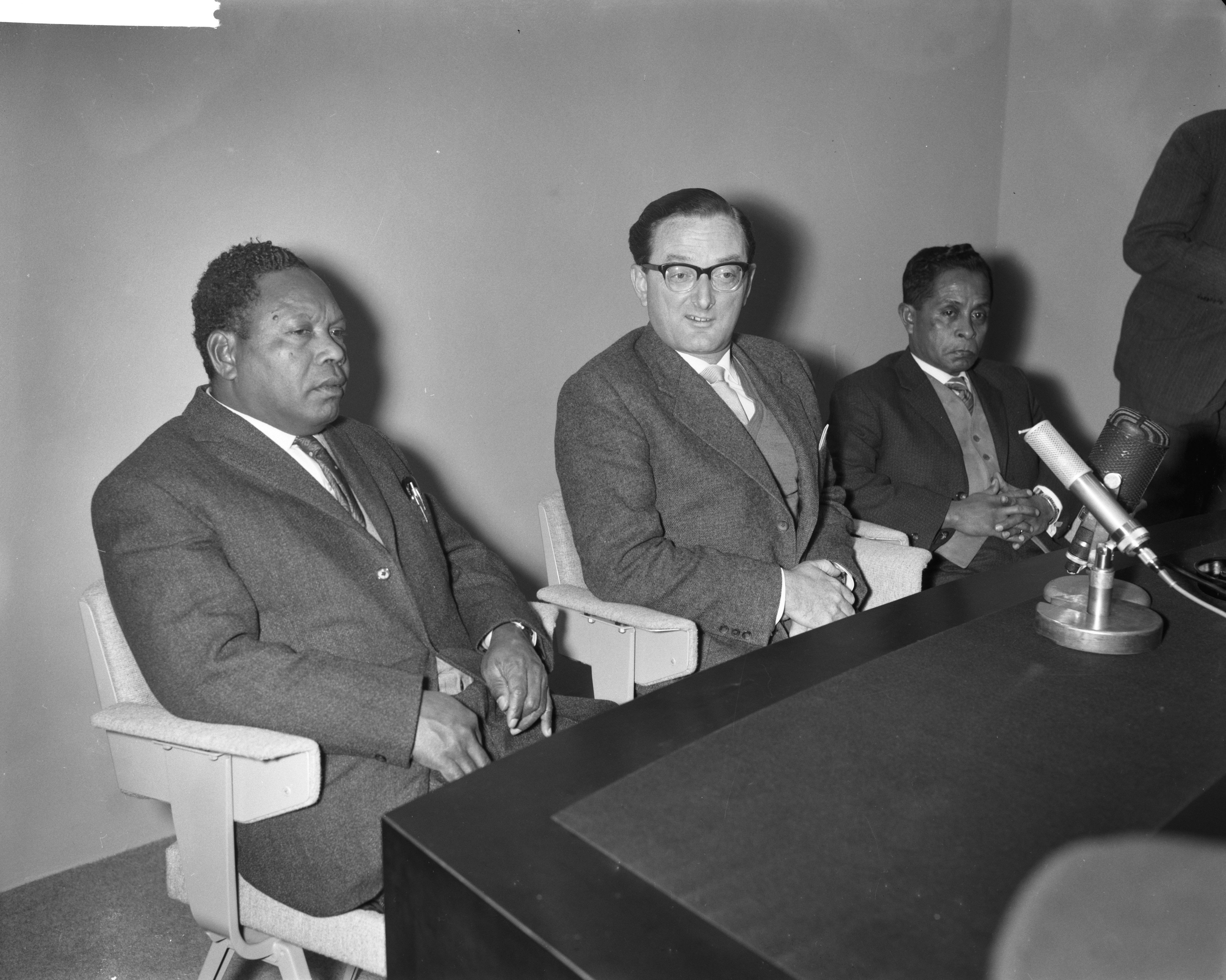 Collectie / Archief : Fotocollectie Anefo Reportage / Serie : [ onbekend ] Beschrijving : Voorzitter en twee leden Nieuw Guinea Raad terug naar Nieuw-Guinea. B. Mofu , Abdul Arfan en Sollewijn Gelbke Datum : 3 januari 1962 Trefwoorden : leden, voorzitters Fotograaf : Bilsen, Joop van / Anefo Auteursrechthebbende : Nationaal Archief Materiaalsoort : Negatief (zwart/wit) Nummer archiefinventaris : bekijk toegang 2.24.01.04 Bestanddeelnummer : 913-3648